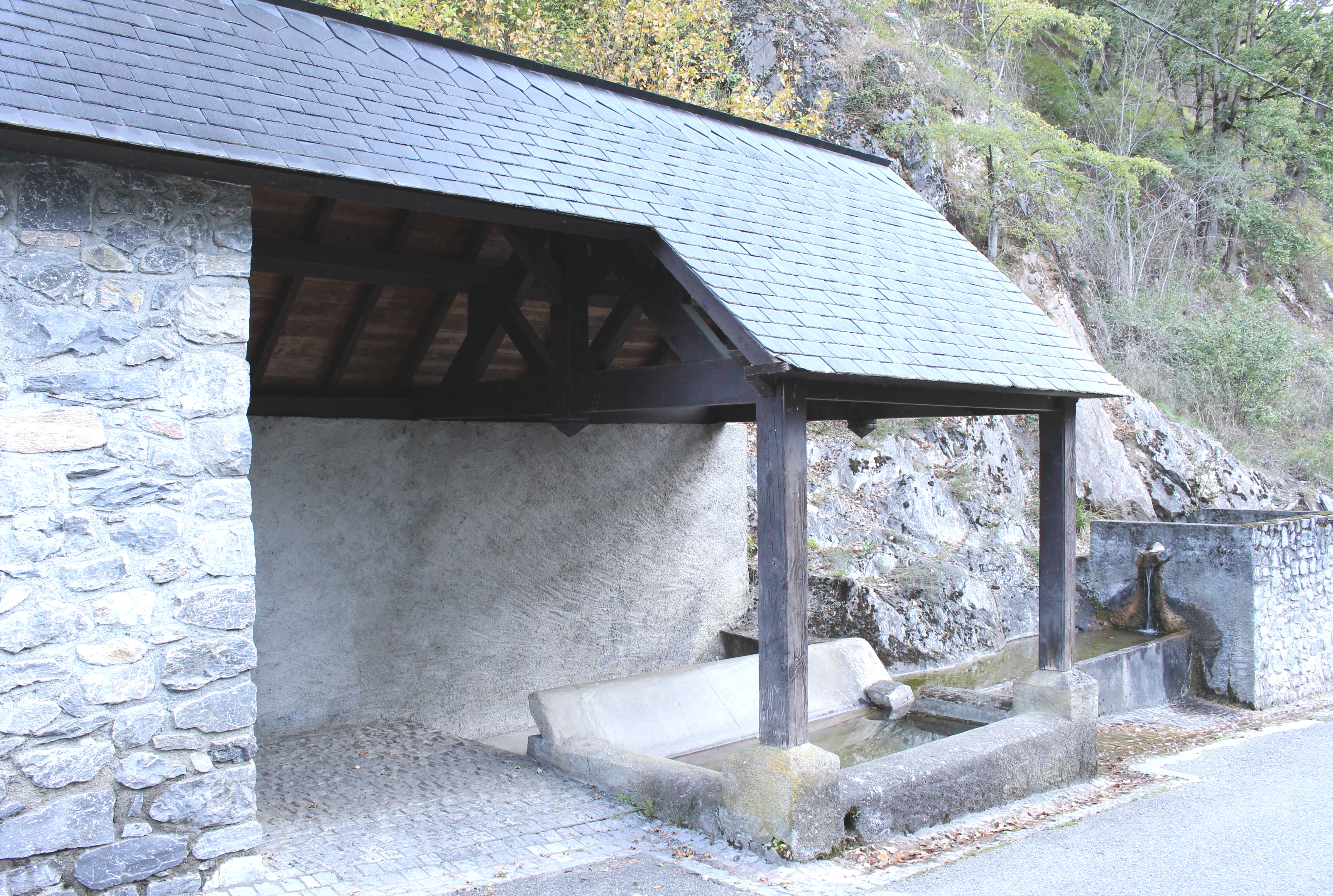 Lavoir de Saint-Pastous (Hautes-Pyrénées)